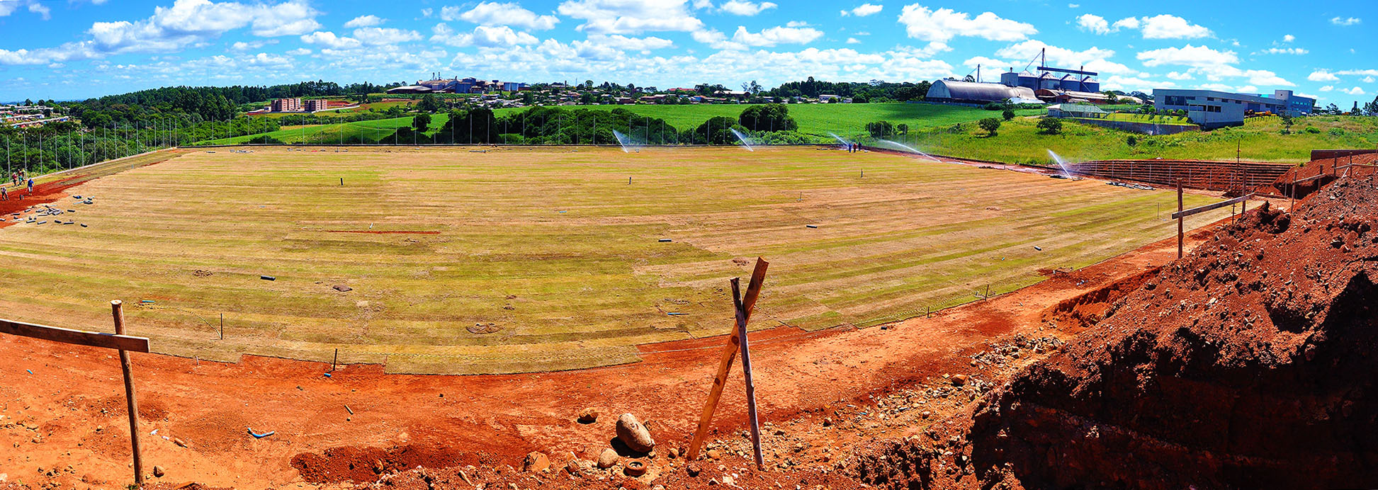 Construção do novo Estádio Wolmar Salton, do Sport Clube Gaúcho de Passo Fundo-RS, já com o plantio da grama